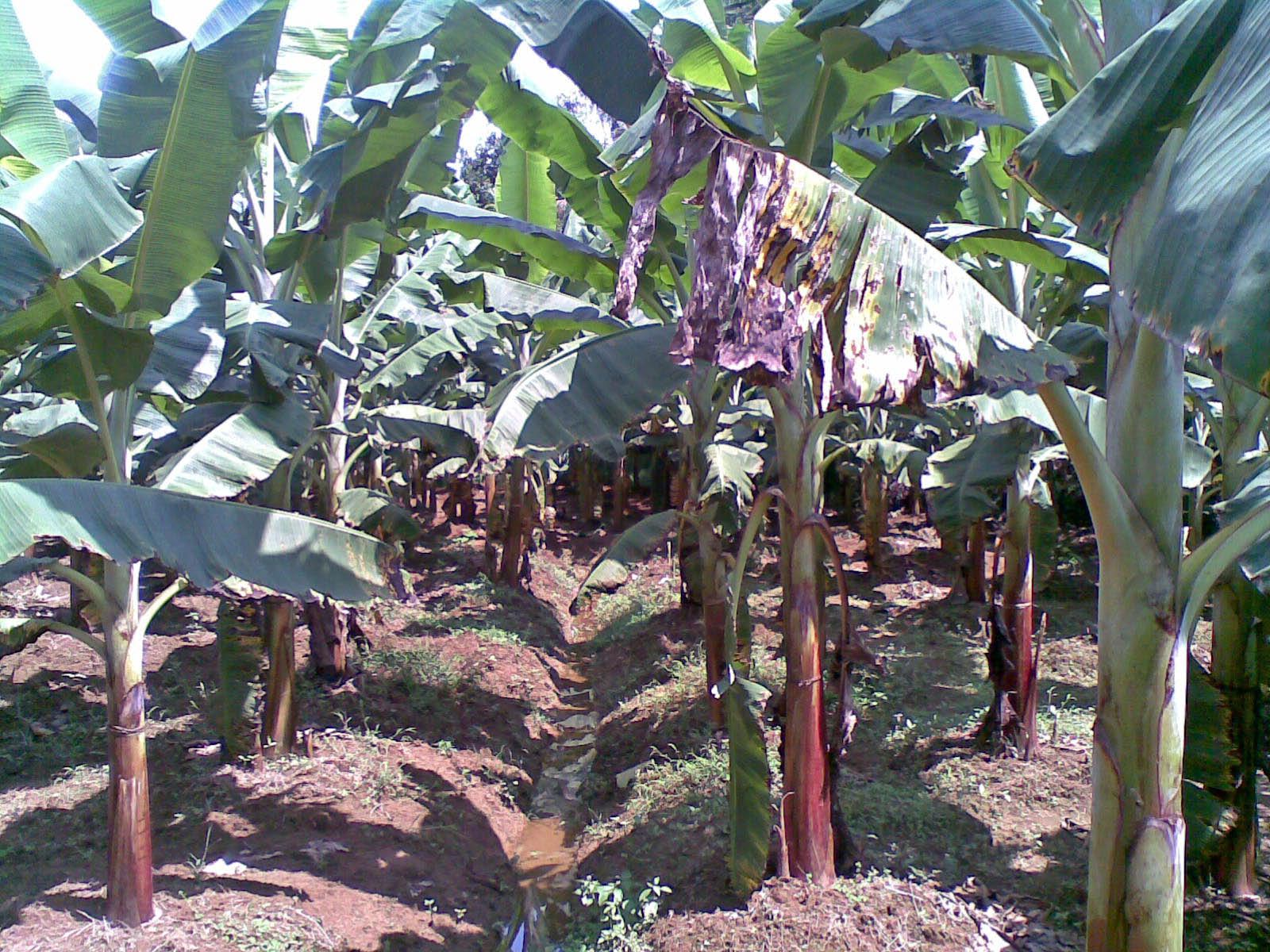 നിരനിരയായി നില്‍ക്കുന്ന പച്ചപിടിച്ച വാഴത്തൈകള്‍ക്കിടയിലൂടെ വെള്ളമൊഴുകിപ്പോകാനായി കനാലുകള്‍ ഉണ്ടാക്കുന്നു.